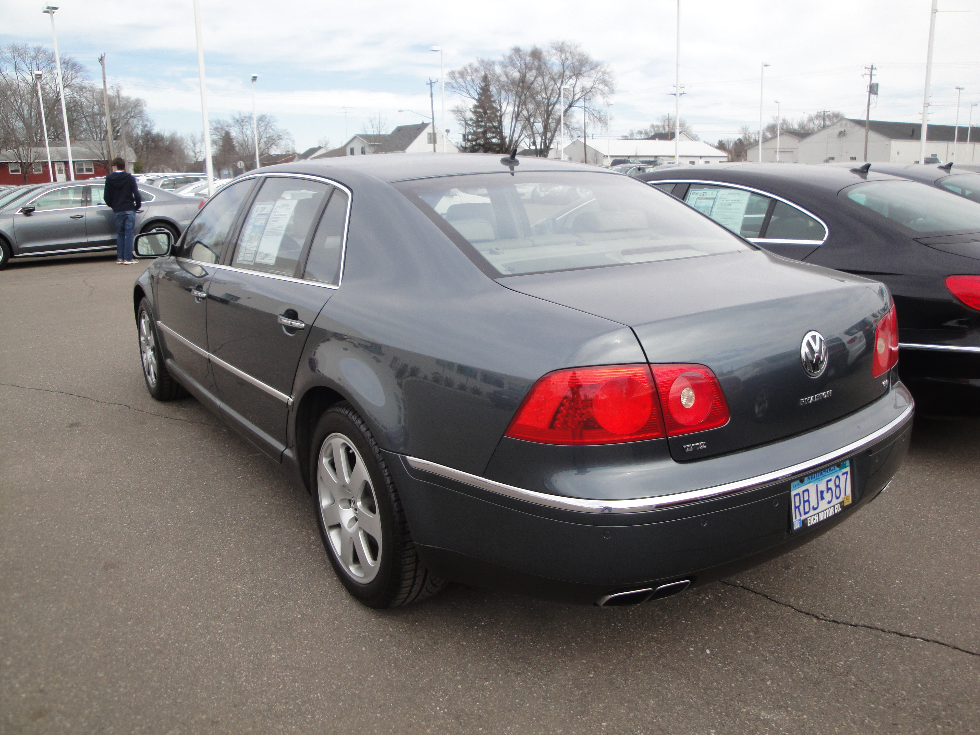 6.0 W12